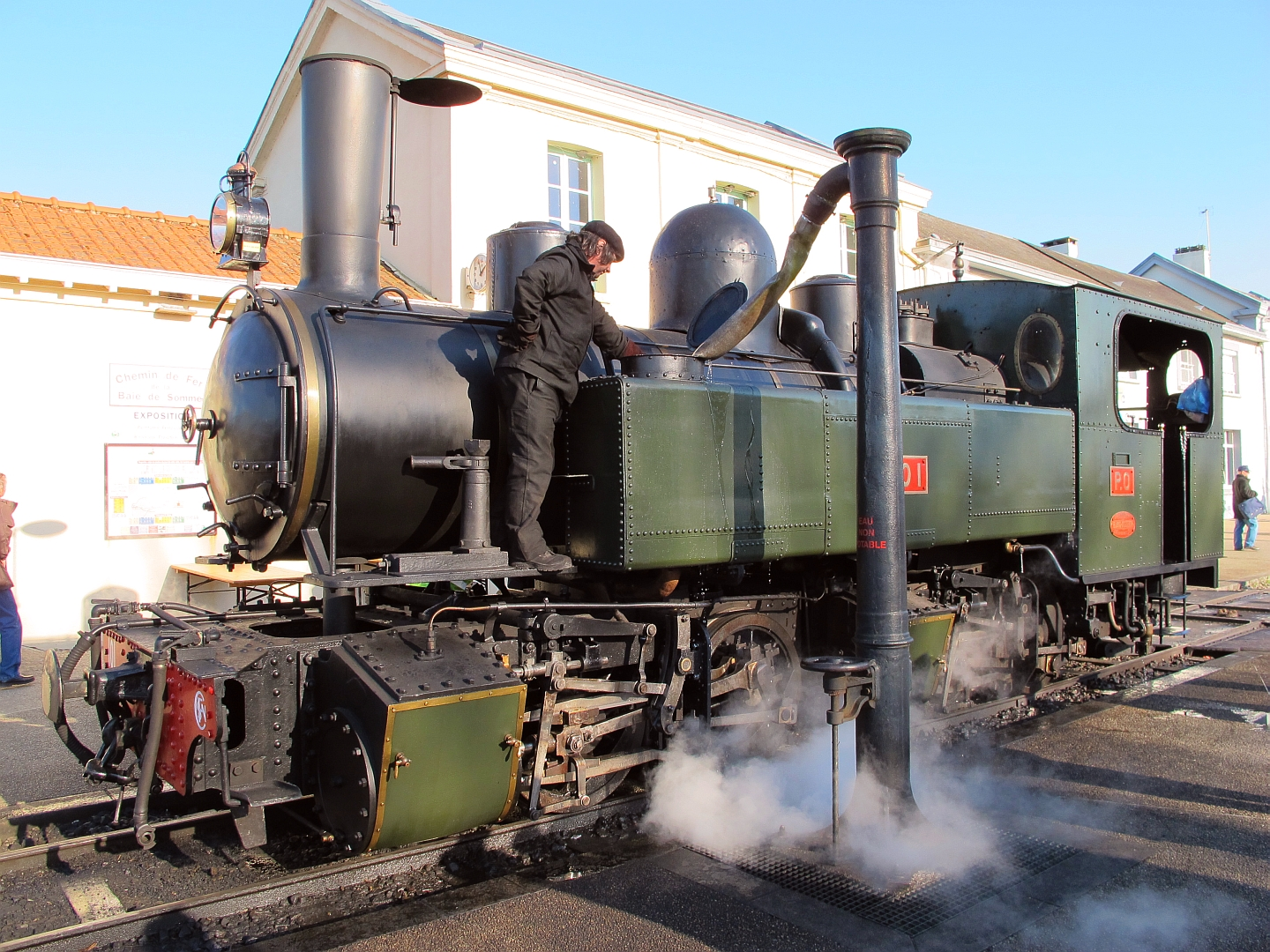 La locomotive Mallet n°101 POC des voies ferrées du Velay, en déplacement sur le chemin de fer de la baie de Somme pour la fête de la vapeur le 28 avril 2013.